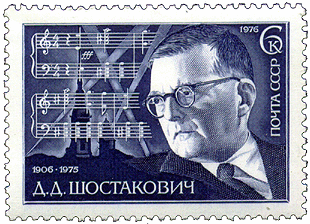 Почтовая марка СССР - Шостакович Дмитрий Дмитриевич, Герой Социалистического Труда. На марке изображён портрет композитора по фото 1940-х годов, часть нотной записи Седьмой симфонии, Петропавловская крепость, ленинградское небо в лучах зенитных прожекторов. Оформление В. Коваля, гравюра на металле В. Смирнова. Номер (ЦФА) — 4632. Тираж — 3,5 млн экз.